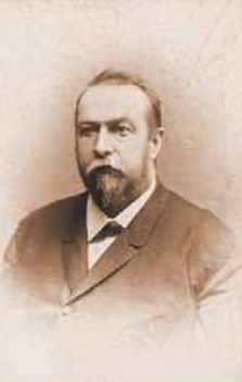 Mamert Knapp (1837 - 1896), Český nakladatel, knihtiskař a knihkupec.